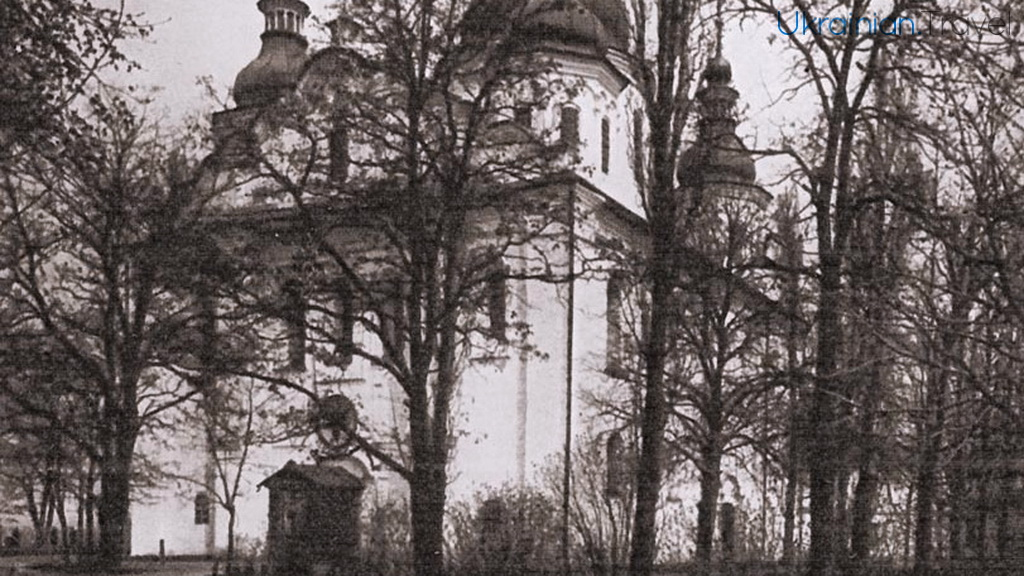 Кирилівська церква. Фото початку ХХ ст.